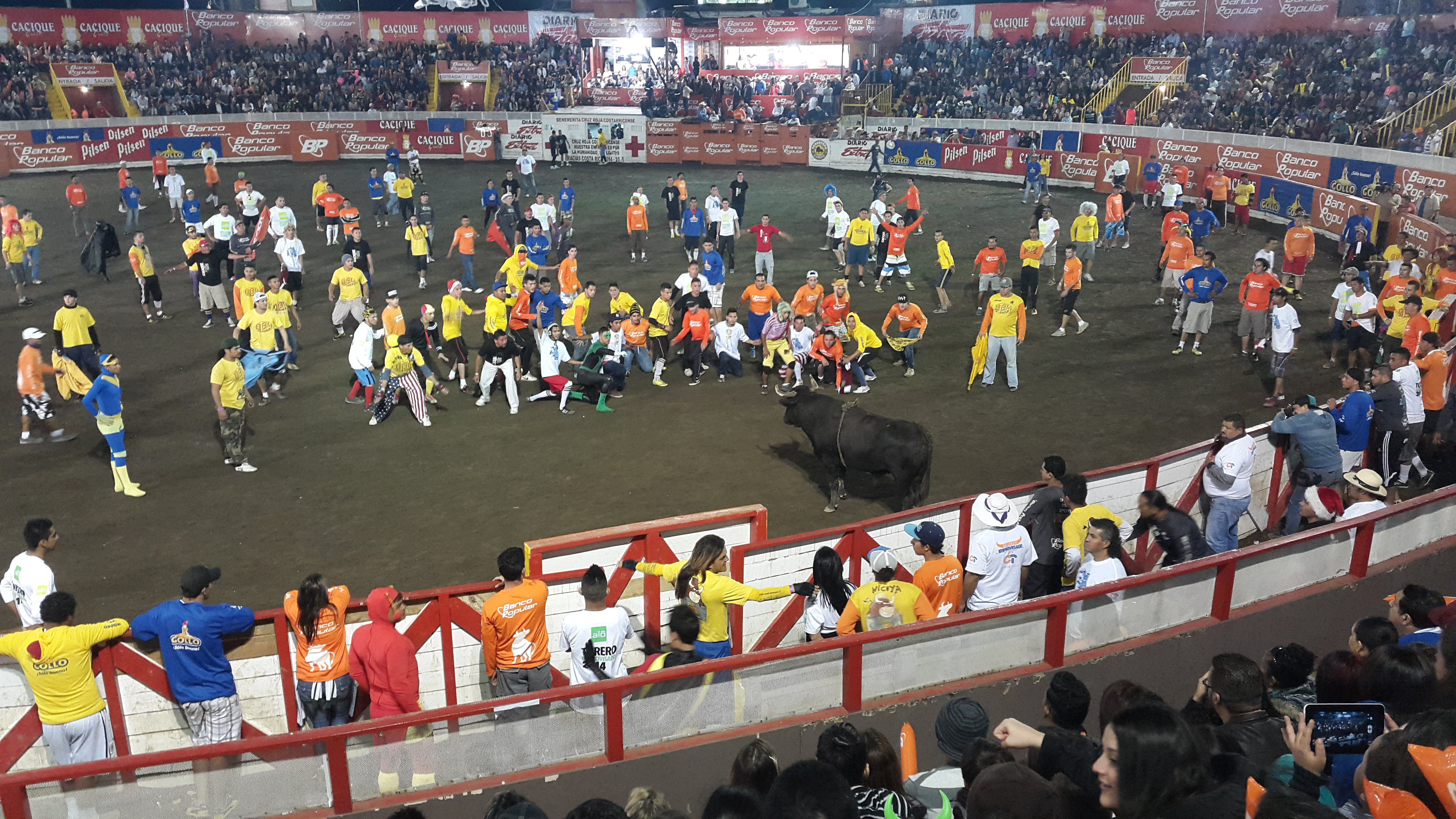 Corrida de toros a la tica en las Fiesta de Zapote, San José, Costa Rica, el 3 de enero de 2015.